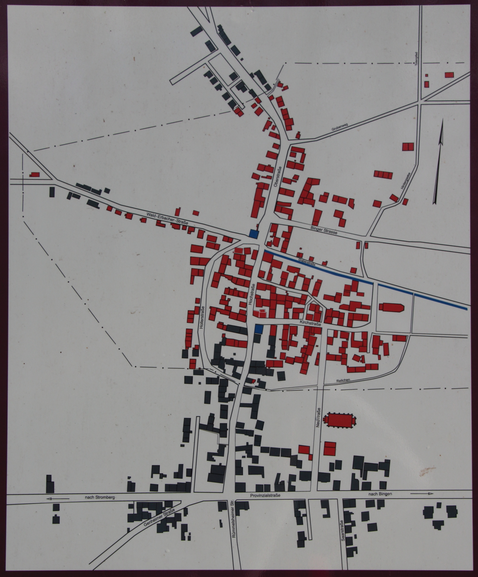 Infotafel Waldalgesheim: Bebauung im Jahr 1908. Rot markiert sind die Häuser, die später als Folge der Bergbauschäden der Grube Dr. Geier (Amalienhöhe) abgebrochenen werden mussten, schwarz markiert die verbliebenen Häuser. Die Grenze des Schadensgebietes ist mit der gestrichelten Linie markiert. Waldalgesheim, Kreis Mainz-Bingen